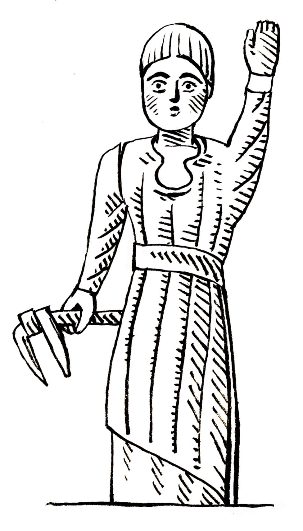 Xaindia, statue, Saint-Sauveur d'Iraty, Pyrénées-Atlantiques, Pays basque, France